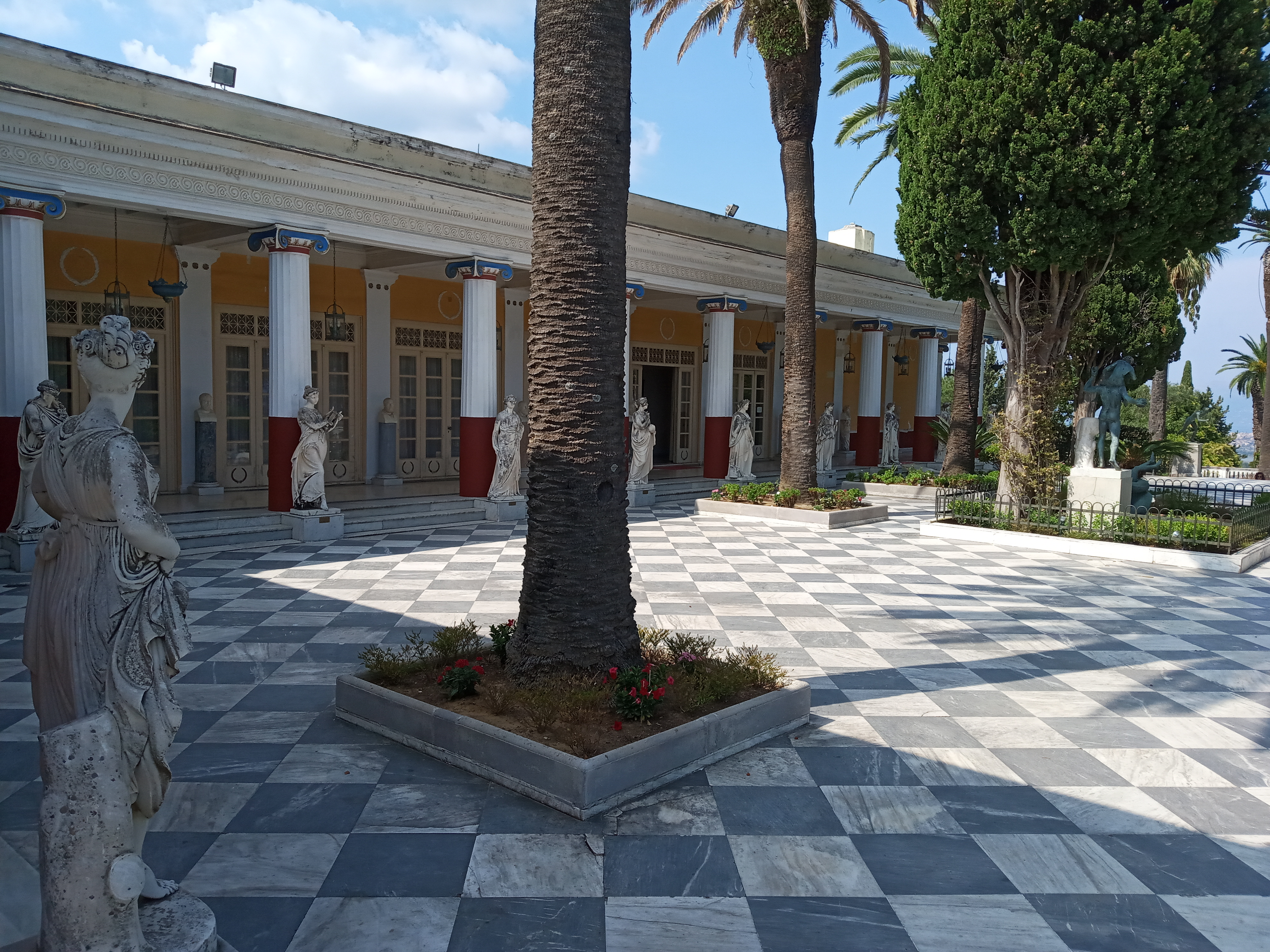 Ахілліон верхня терасса з статуями муз і риторів, філософів